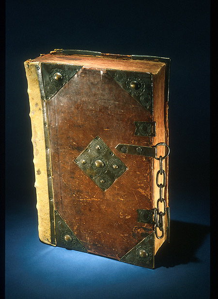 Buch. Commentarii linguae graecae, 1548 von Guillaume Budé